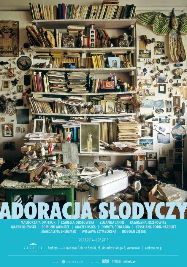 Plakat promujący wystawę Adoracja słodyczy w warszawskiej Zachęcie. projekt graficzny: Maciej Sikorzak praca wykorzystana na plakacie: Nicolas Grospierre, Pracownia Krystiany Robb-Narbutt, 2010